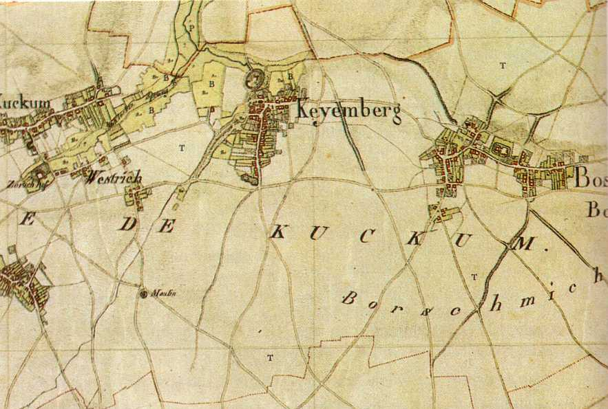 Map of Kuckum, Keyenberg, Borschemich (Erkelenz, D) Mairie de Kuckum, Kartenaufnahme des Rheinlands von Tranchot/Müffling, (Aufnahme von 1806/07)